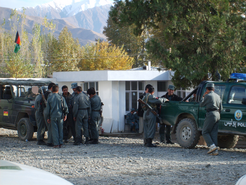 Polizeistation von Feyzabad